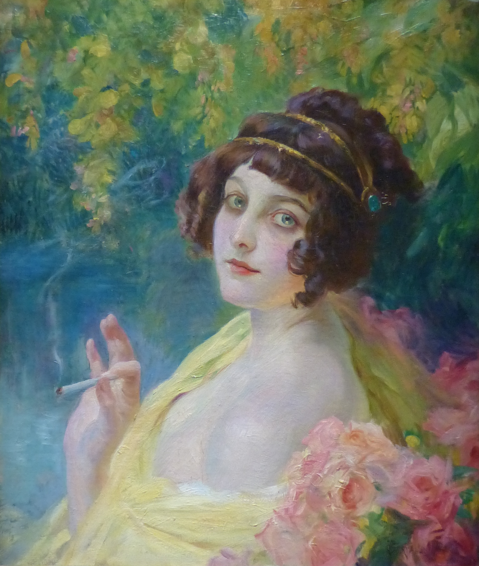 Perpignan (Pyrénées-Orientales, France), musée Hyacinthe Rigaud, collection peinture civile. Œuvre transposée en affiche publicitaire pour le papier à cigarettes JOB dès 1907. Paul Gervais réalisa au total sept affiches pour la famille Bardou de 1902 à 1911.